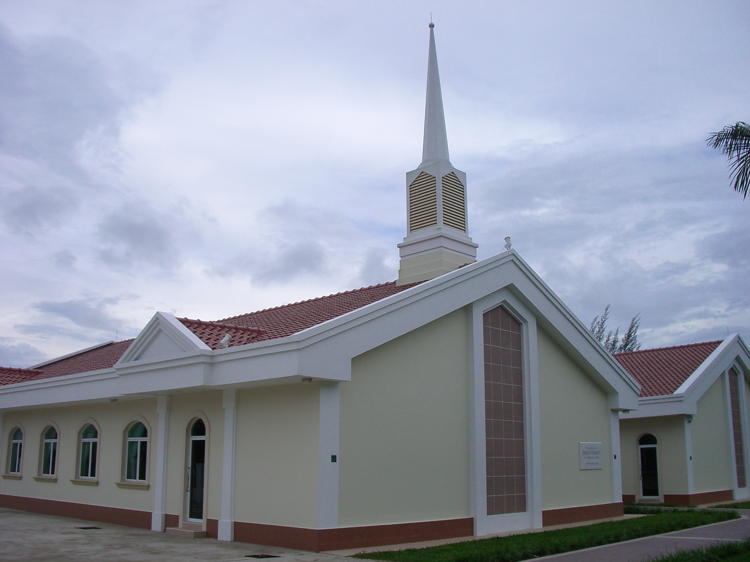 Miri Sarawak LDS Mormon Church